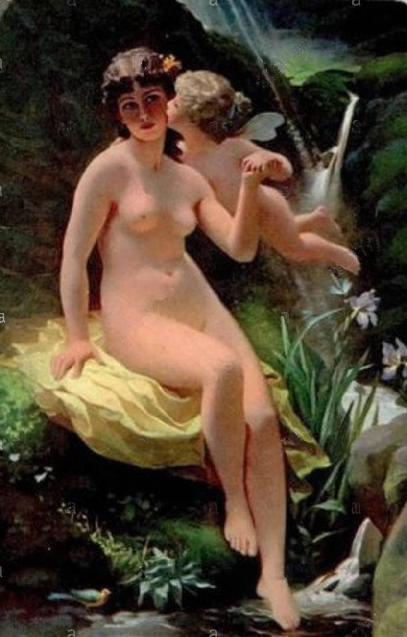 Eugène Faure - Sylphide